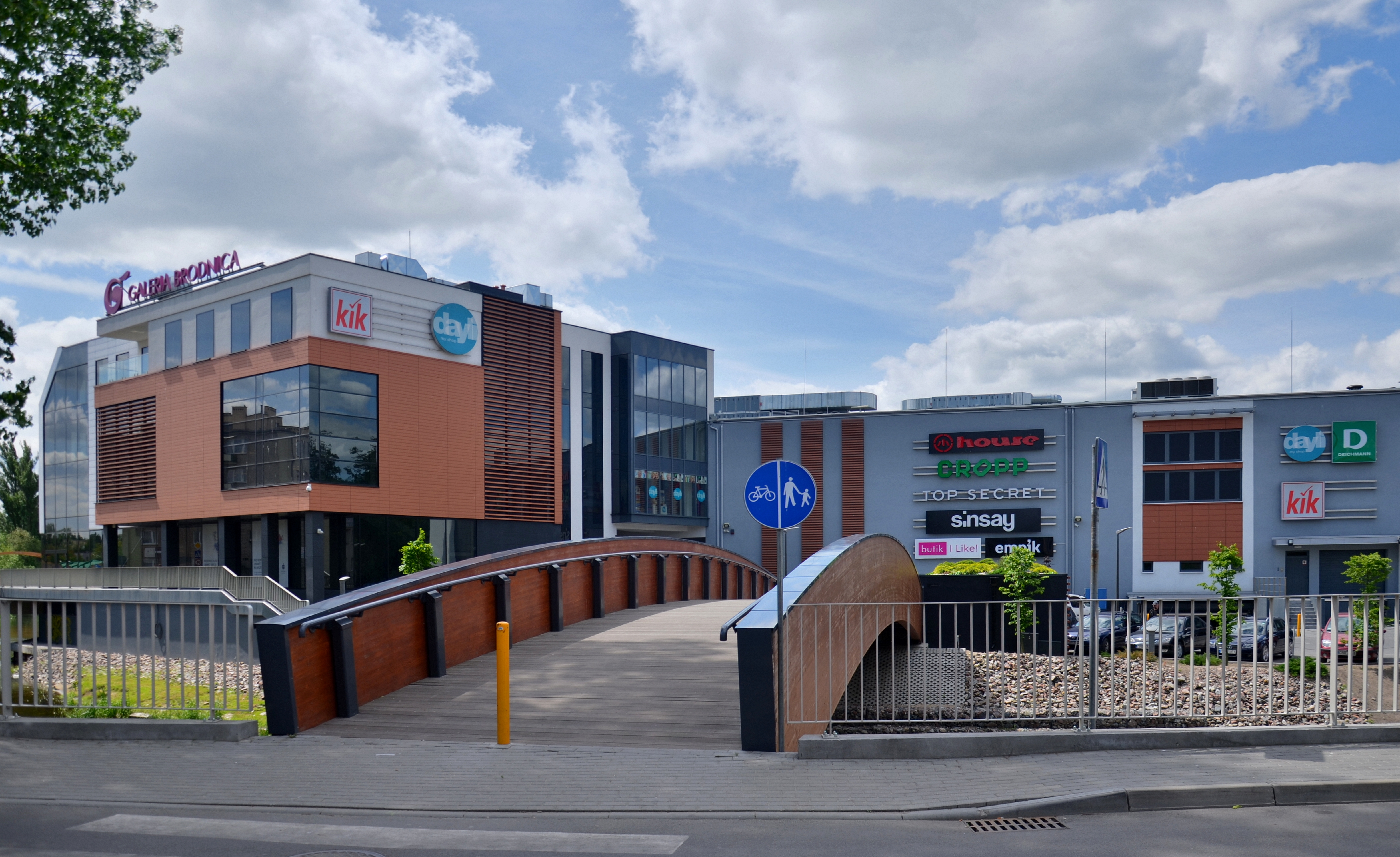 Galeria Brodnica